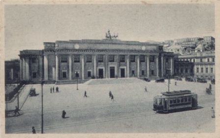 Messina - Trram di fronte al tibunale